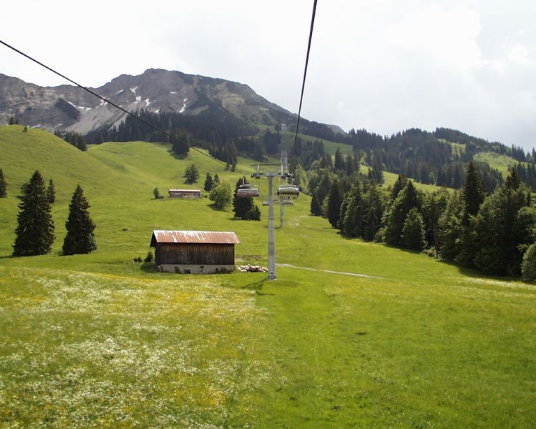 Allgäu, Berg Iseler, Hindelang